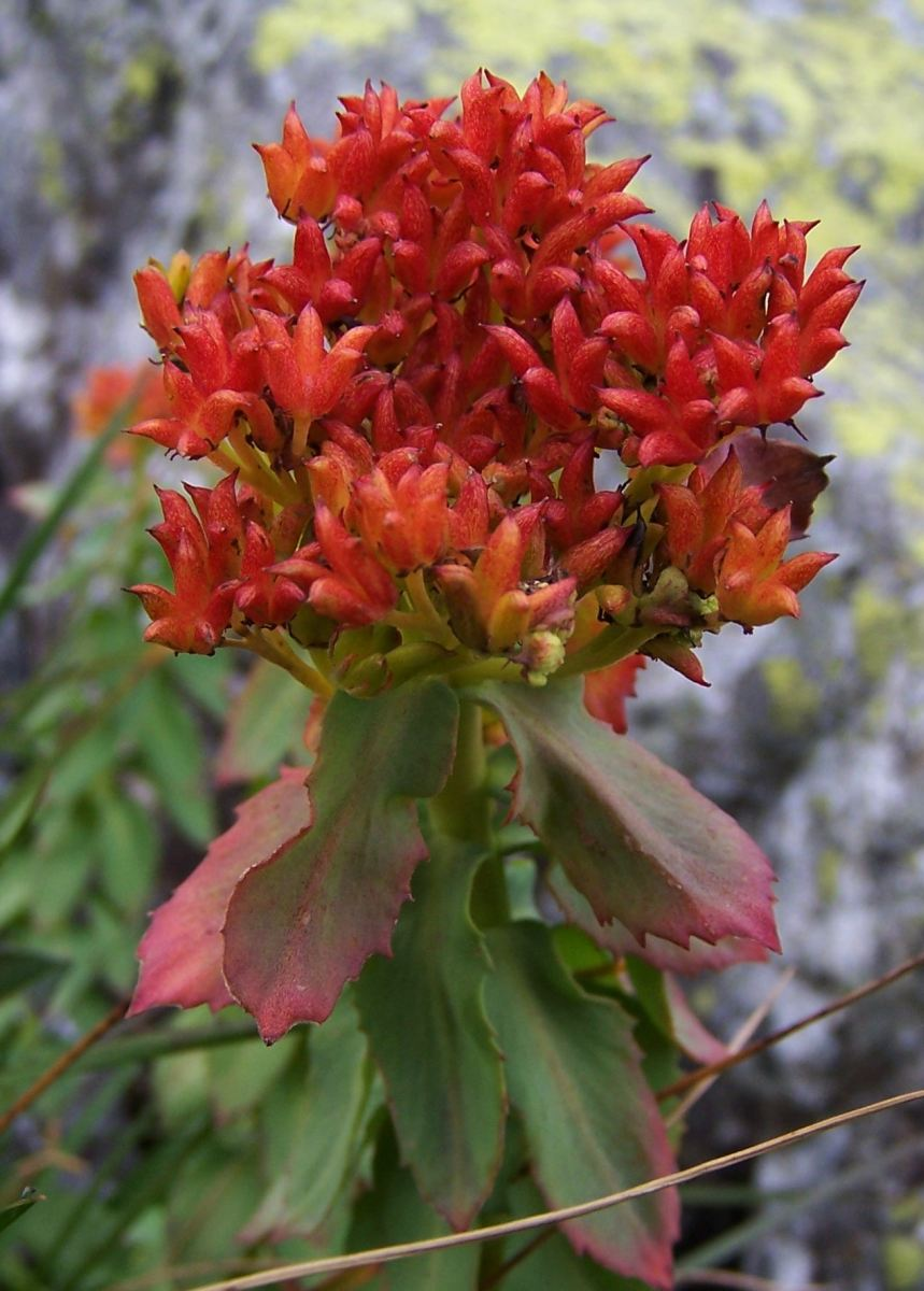 Rhodiola rosea (pl. różeniec górski), habitat: Tatra Mountains, Dolina 5 Stawów Polskich